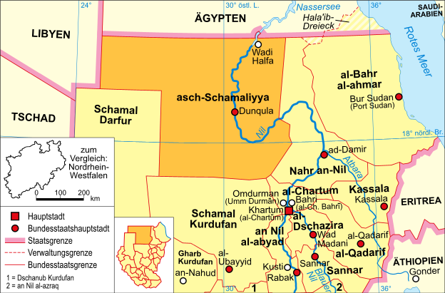 politische Karte des Sudan (Bundesstaat asch-Schamaliyya)